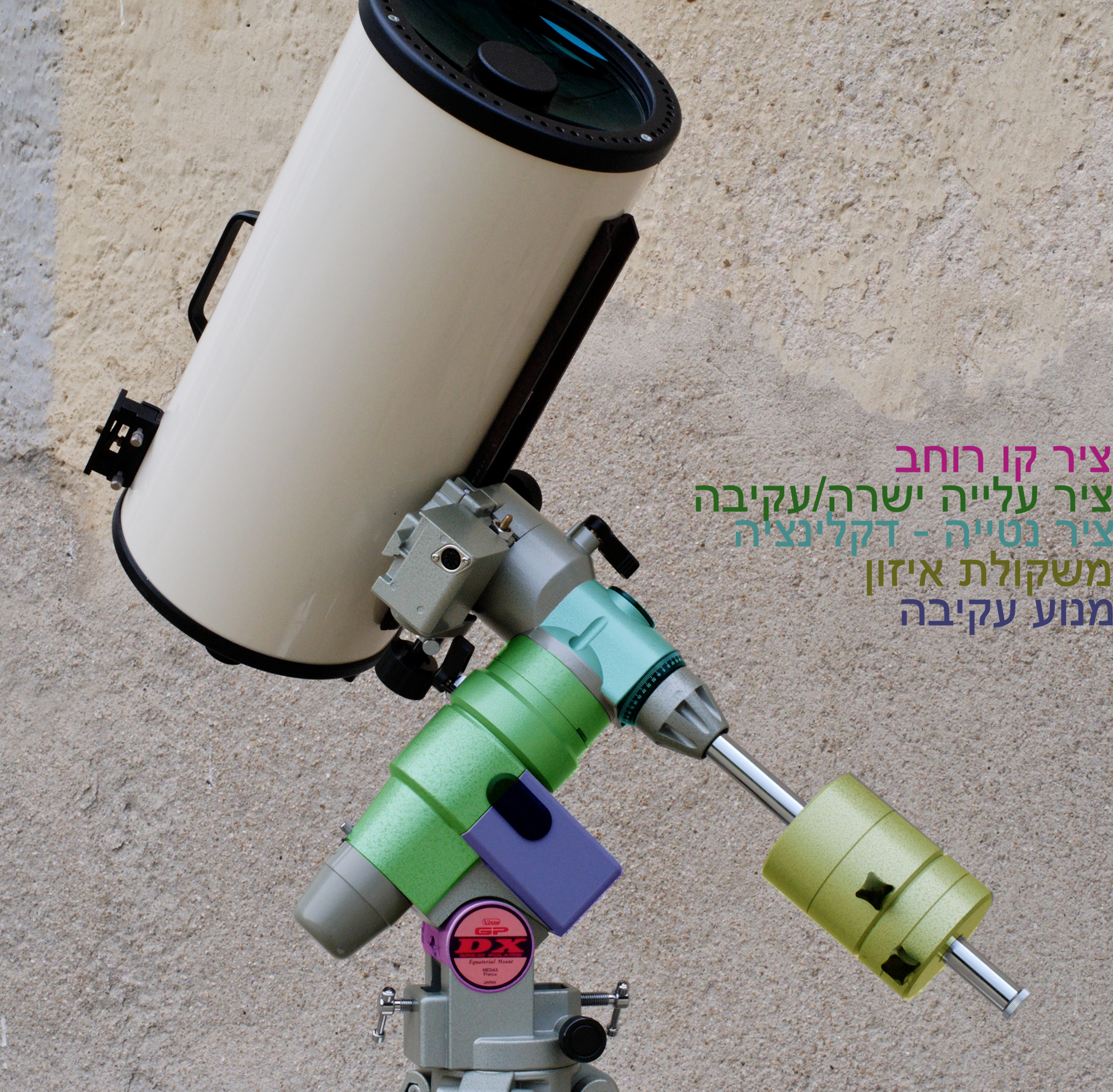 מעמד גרמני לטלסקופ